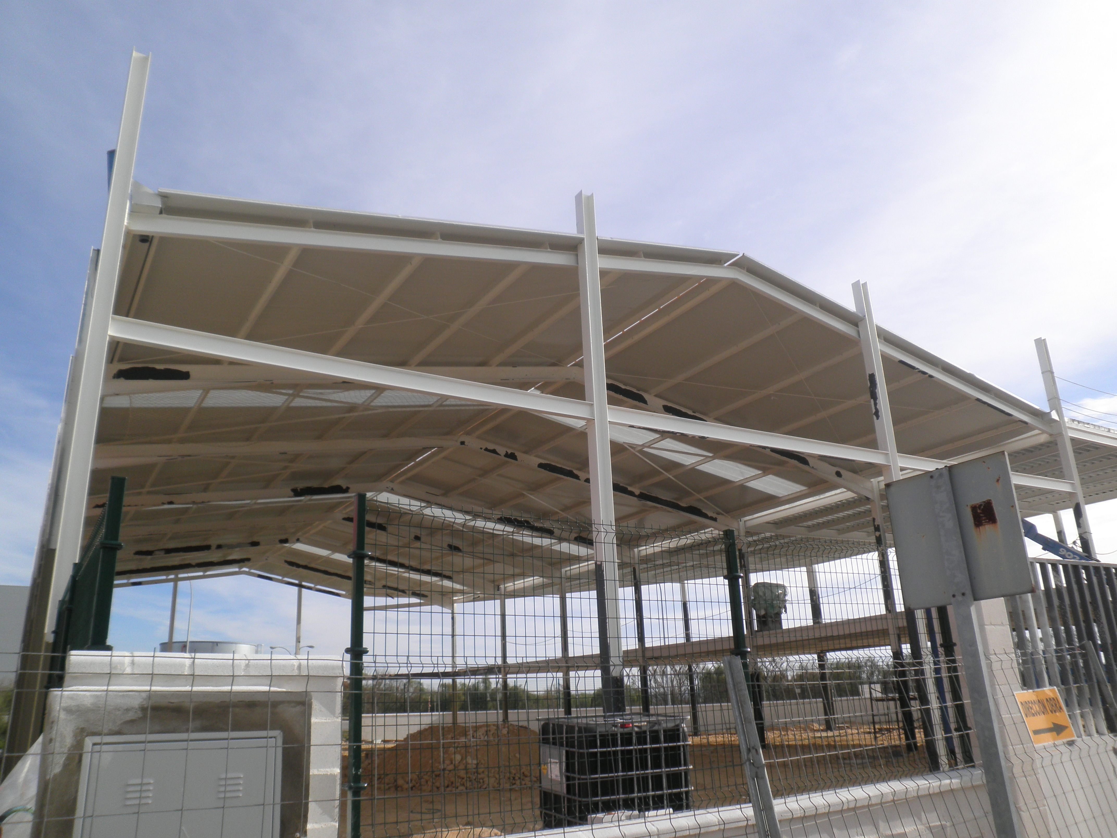 Nave industrial en construcción en el polígono industrial de Trocadero, en Puerto Real, España.